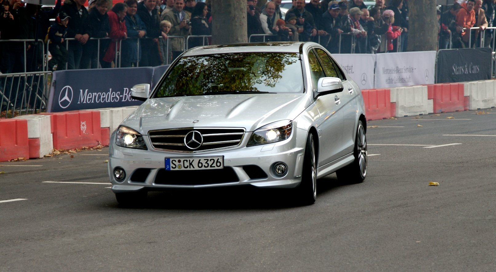 C-Klasse AMG 63